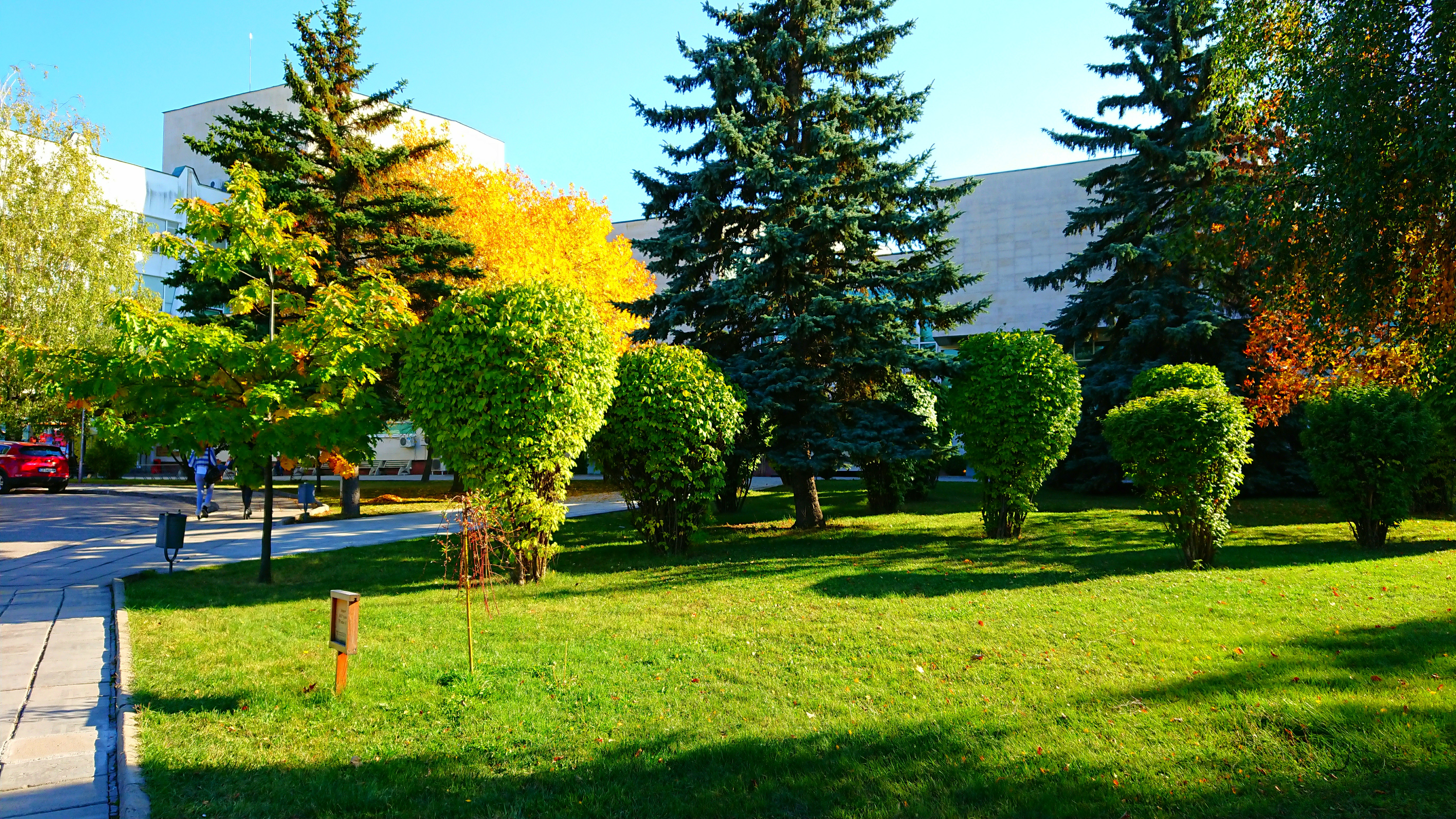 Пред главния вход на УНСС